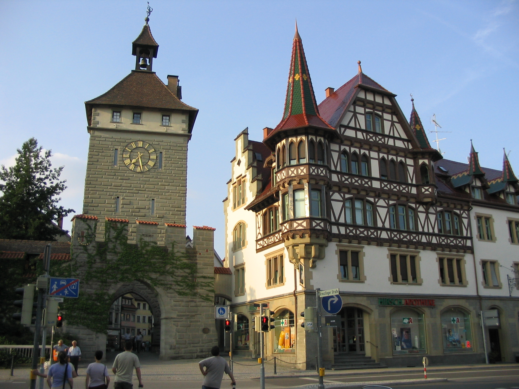 Konstanzer Altstadt: Schnetztor Stadtaußenseite